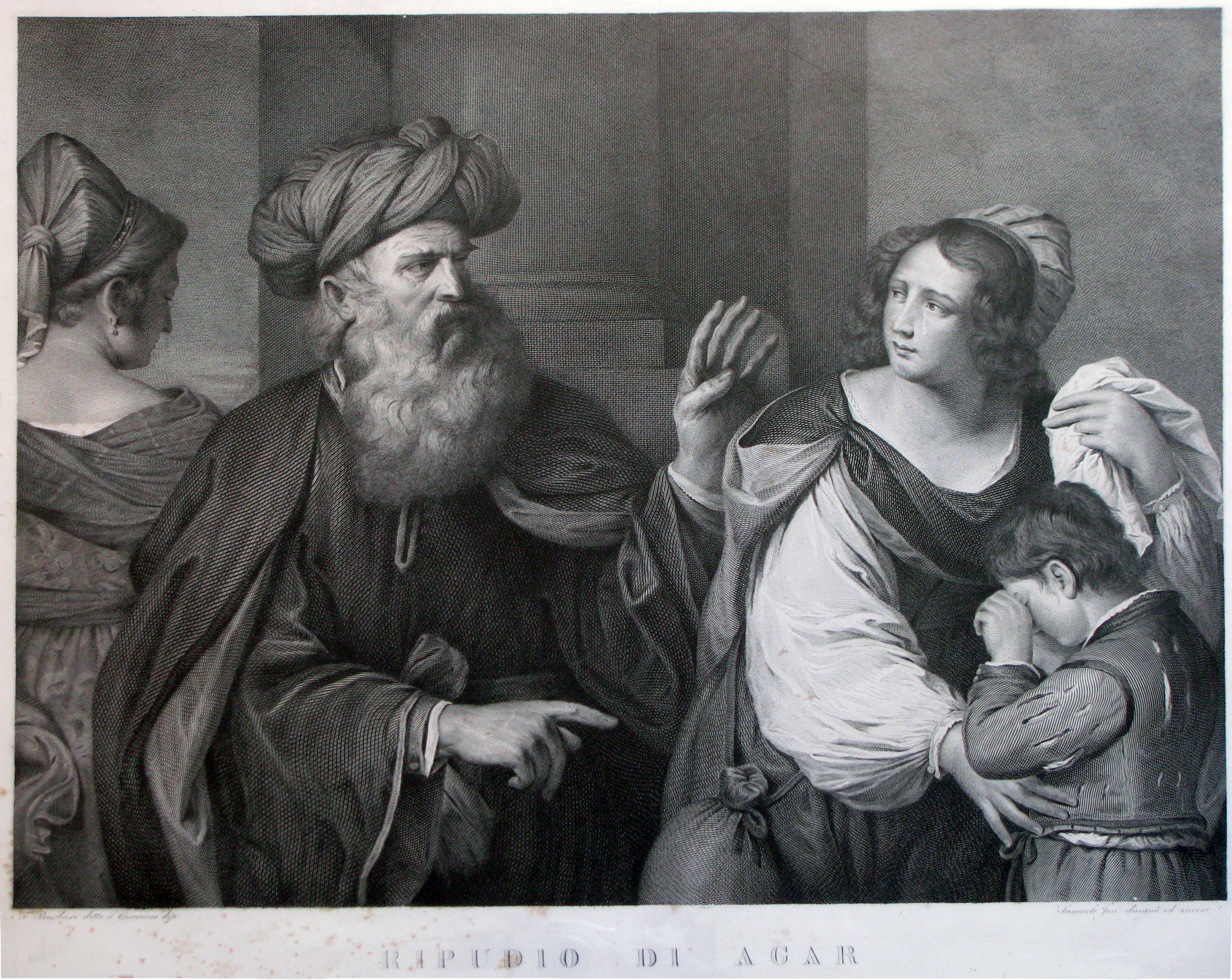 Titolo: "Ripudio di Agar" Incisiore: Samuele Jesi Autore del Soggetto: Giovan Francesco Barbieri detto Guercino (1591-1666) Tecnica: incisione all'acquaforte e bulino Dimensioni parte incisa 385 x 409 mm. Anno: 1821-22